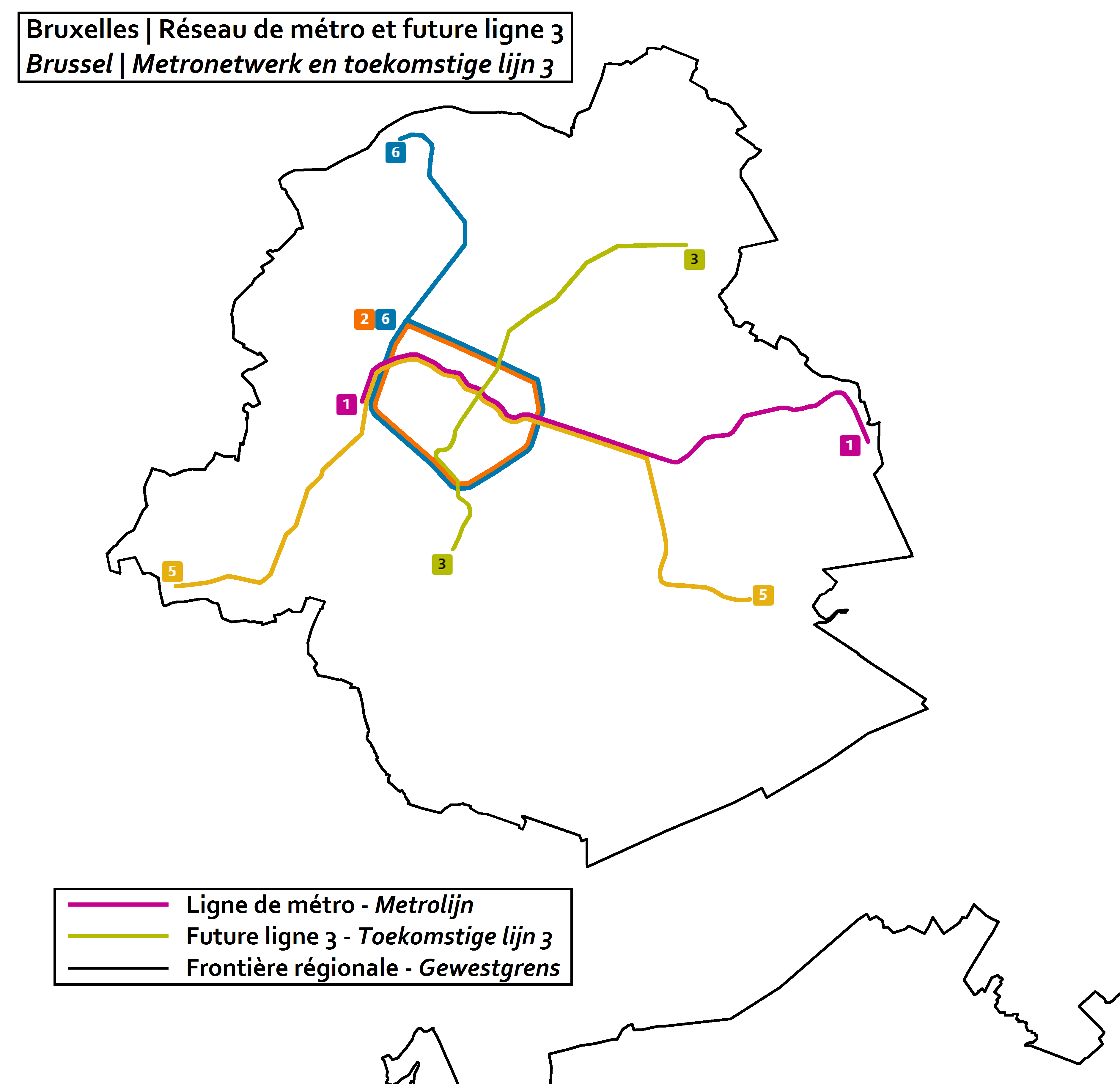 Réseau bruxellois de métro (STIB) incluant la future ligne 3